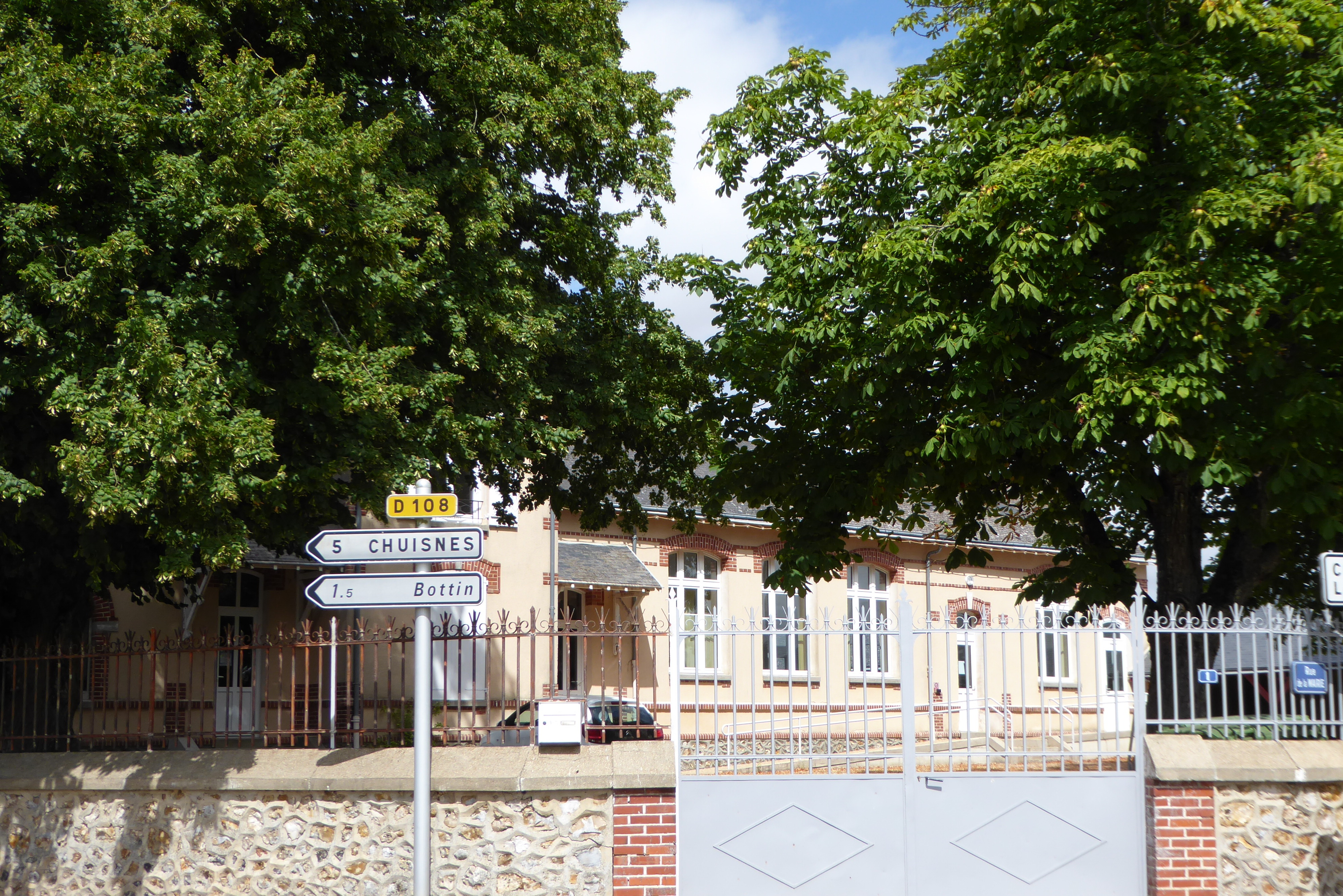 Mairie de Fruncé, Eure-et-Loir (France).